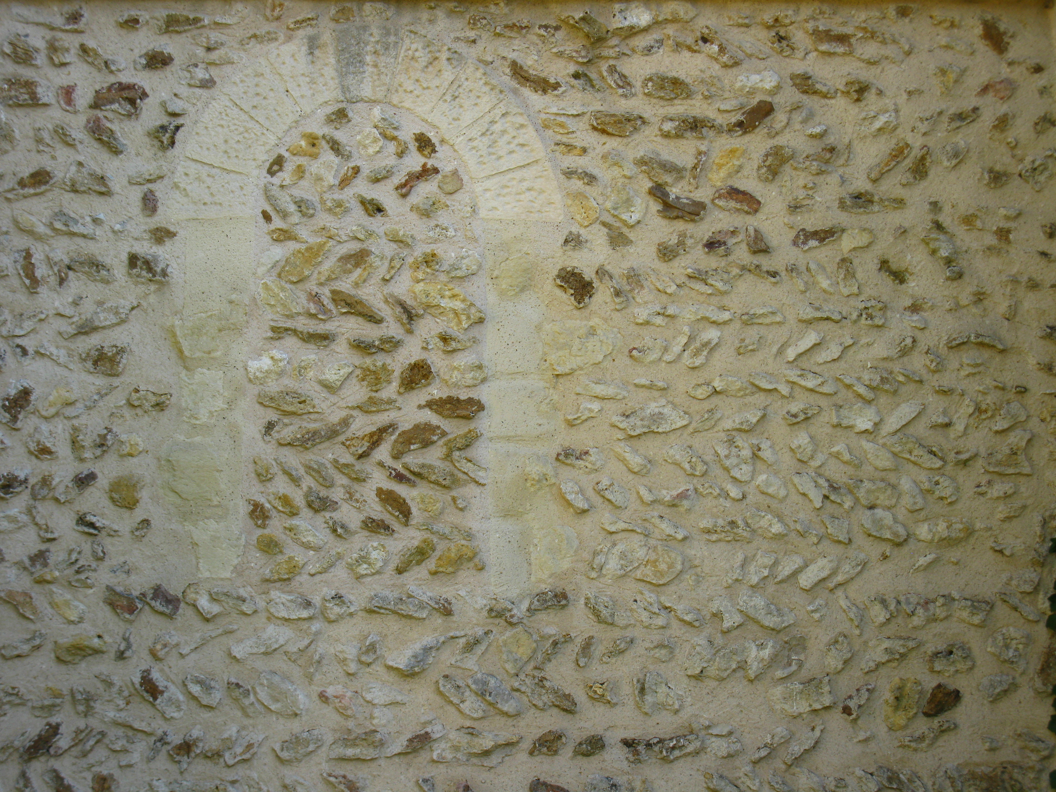 Mur Nord de l'église Saint-Julien-de-Brioude à Marolles-en-Brie (94) ; traces d'une ancienne fenêtre et pierres disposées en épi .